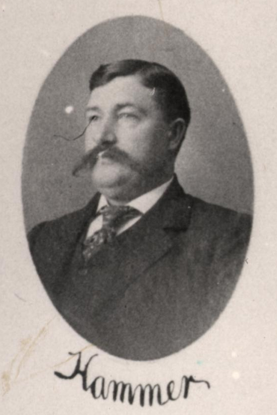 Sen Emerson Hammer